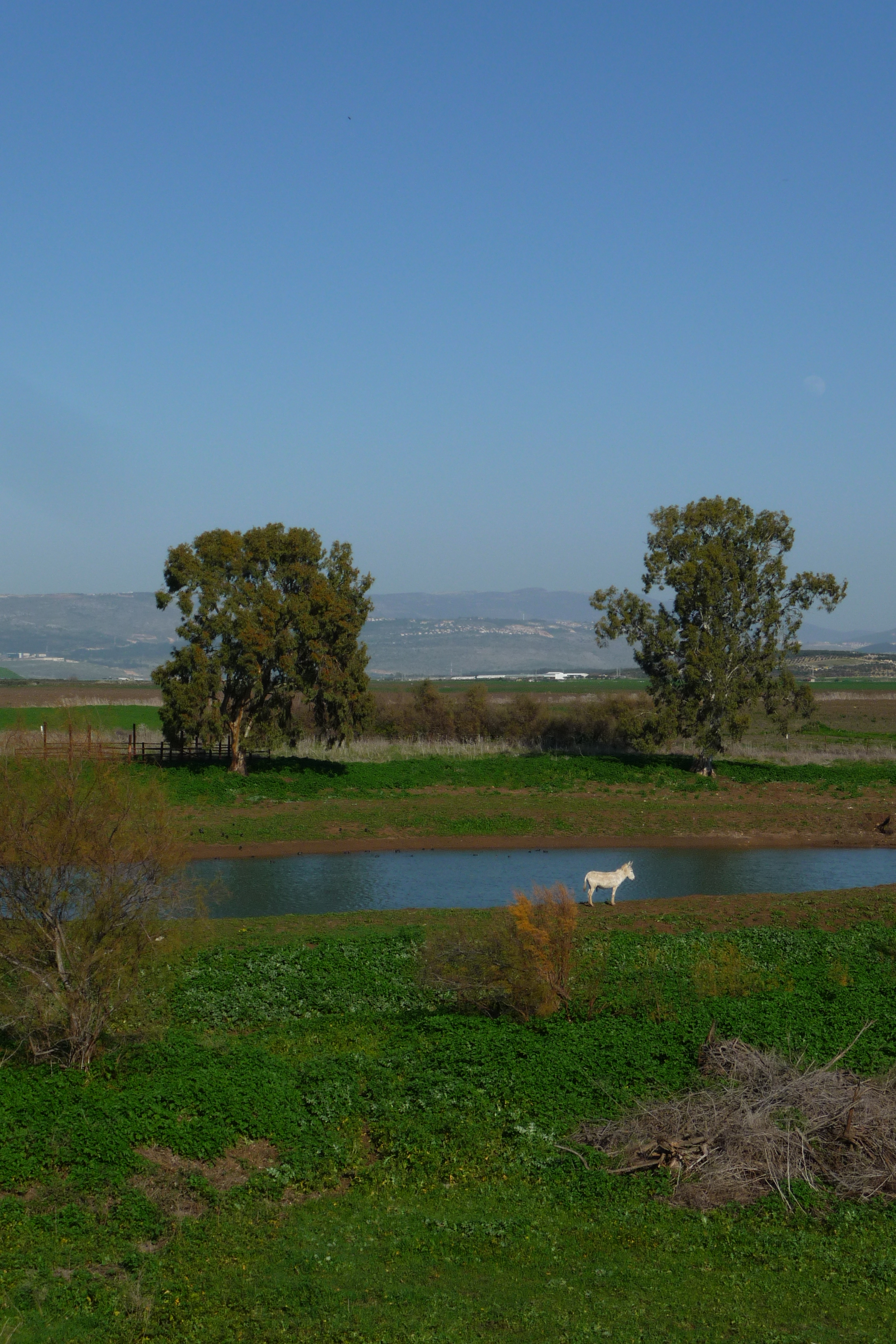 שמורת טבע בעמק זבולון, מזרחית לקריית ביאליק. השמורה כוללת הן את המעיינות והביצות המהווים את מקורו של נחל נעמן והן את האתר הארכאולוגי תל אפק. השמורה הוכרזה ב-1979 והיא משתרעת על פני 660 דונם. ב-1996 הוכרה השמורה כ"אתר רמסר" בהתאם לאמנת רמסר לשימור ולפיתוח בר-קיימא של בתי גידול לחים.